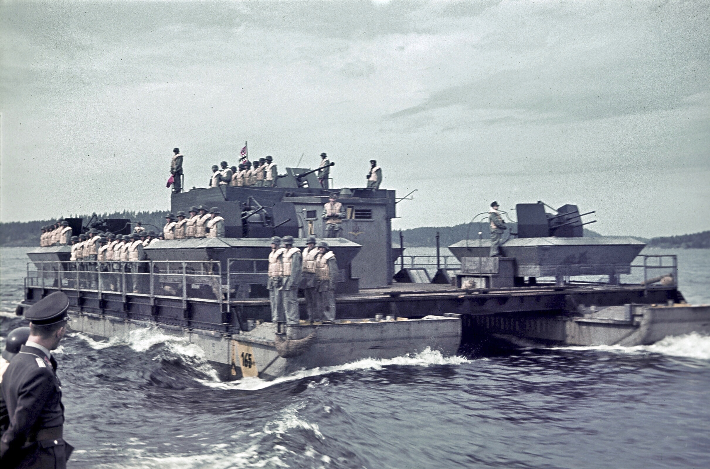 Немецкая быстроходная десантная баржа "Зибель" на параде. Лахденпохья, северное побережье Ладожского озера. 13 августа 1942 г.